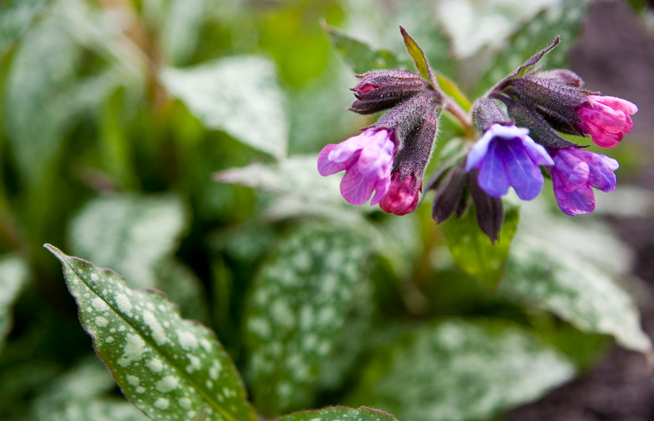 Pulmonaria saccharata